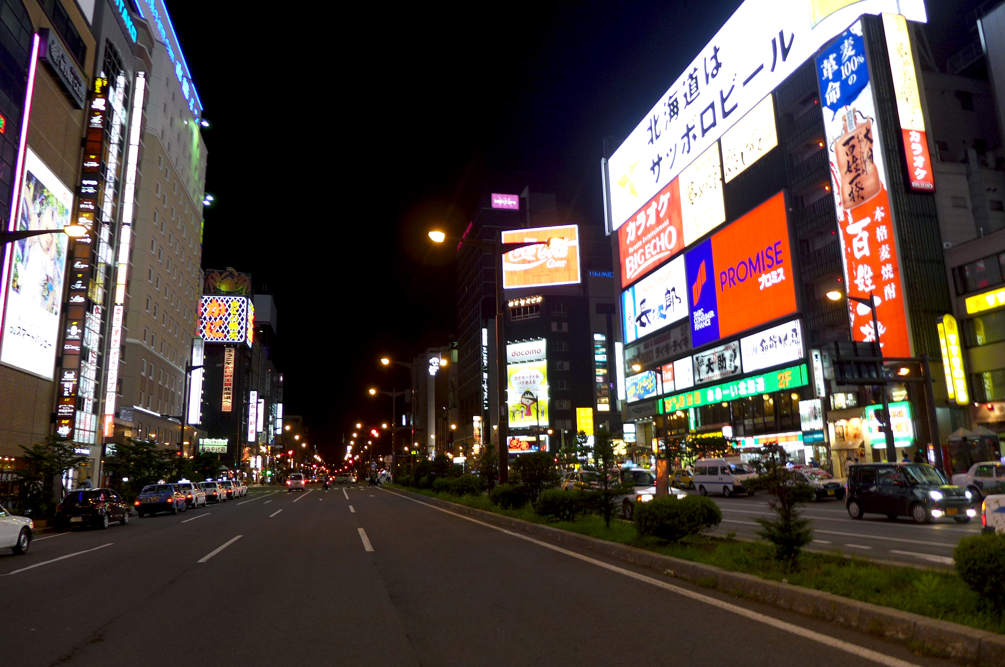 Susukino, Sapporo